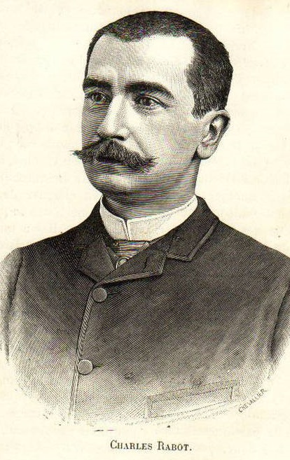 Charles Rabot en 1891, gravure extraite du Magasin Pittoresque